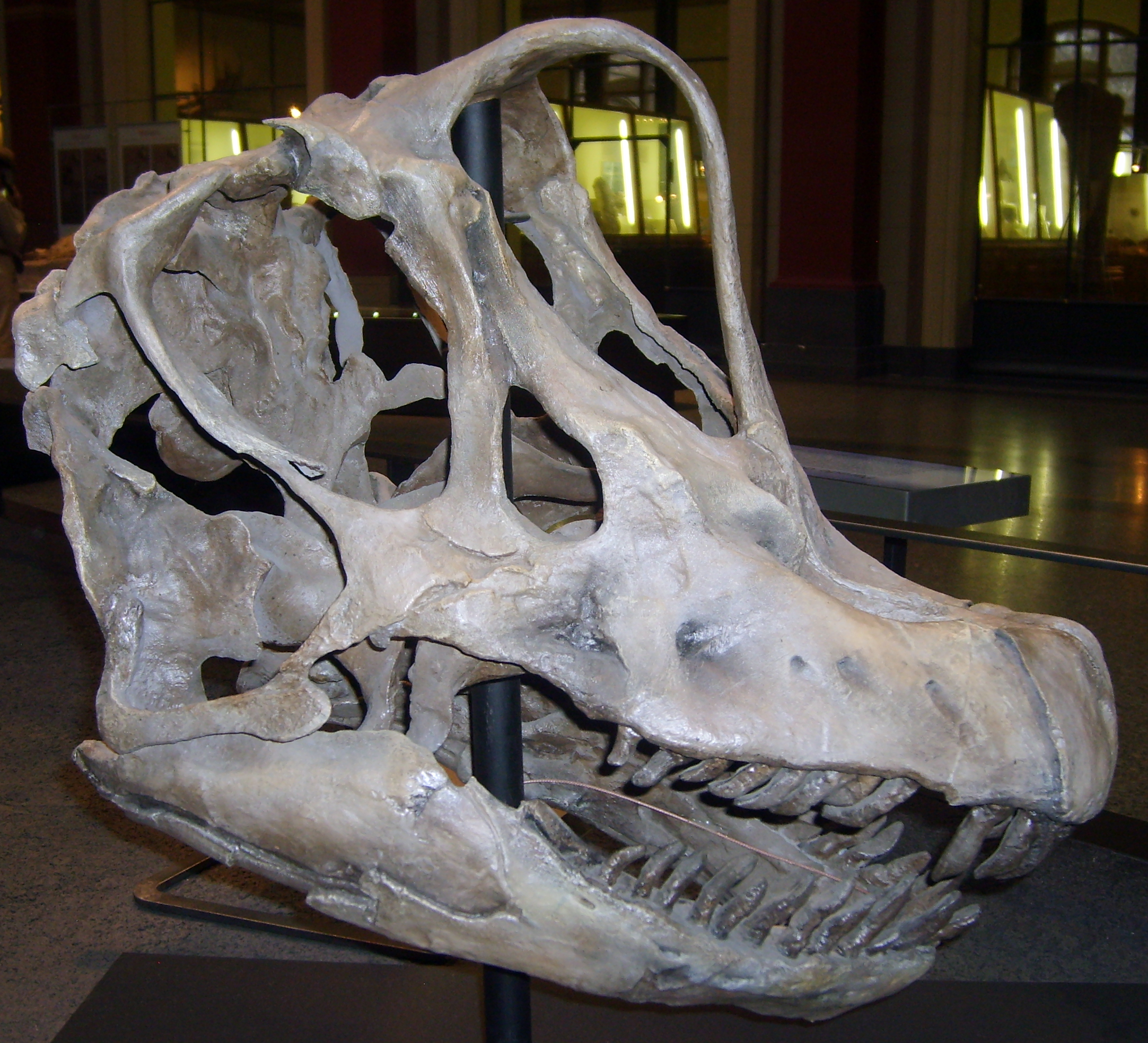 Giraffatitan skull, Naturkunde Museum, Berlin.